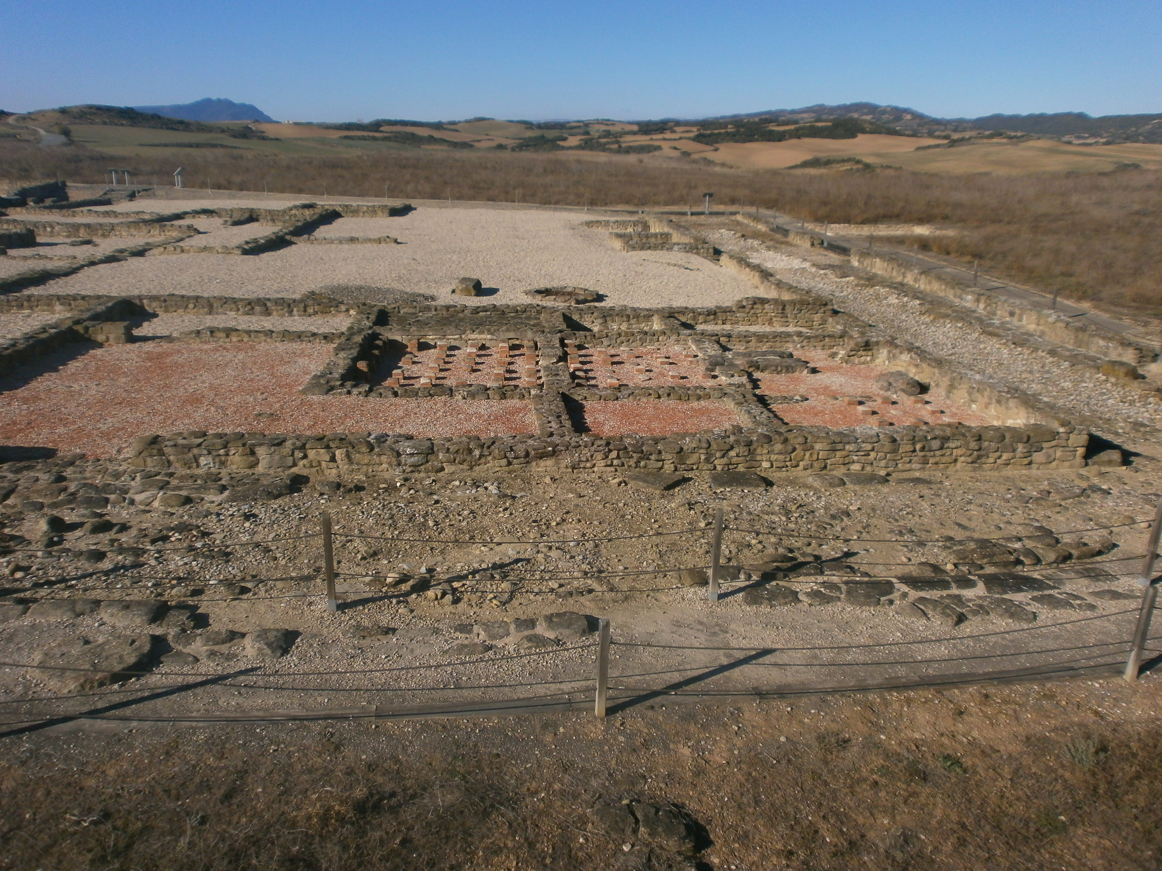 Andelosko aztarnategi arkeologikoa. Termen ikuspegia.